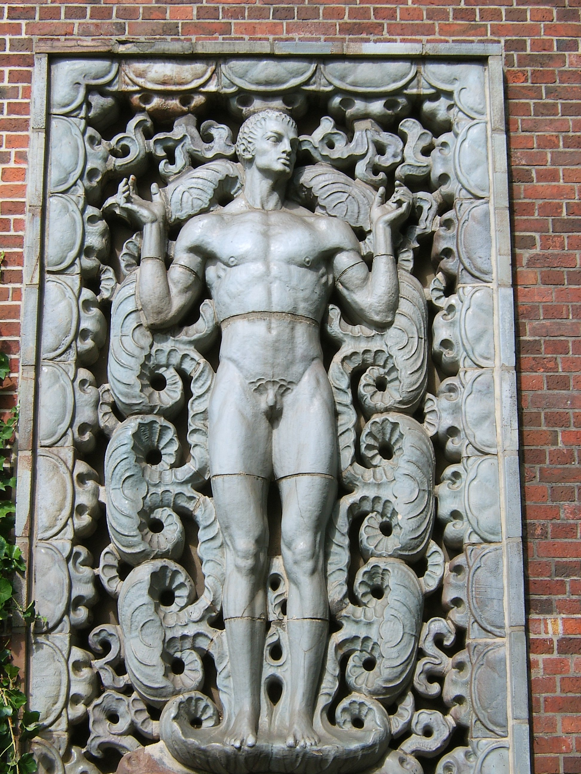 Skulptur von Richard Luksch an der Außenwand der Hochschule für Bildende Künste auf der Uhlenhorst.